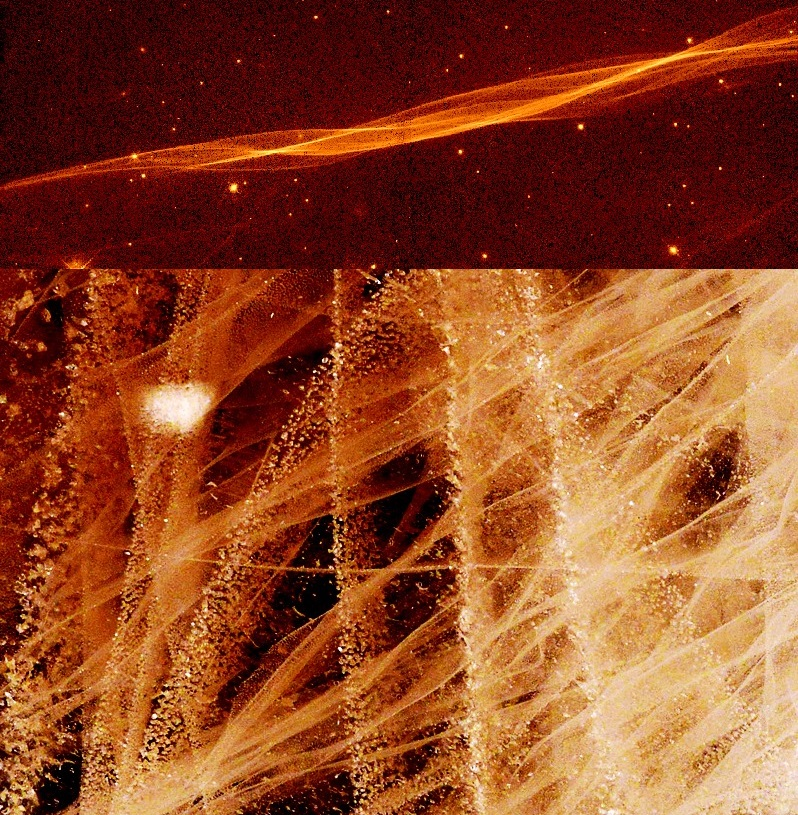 Smyčka a křemen.